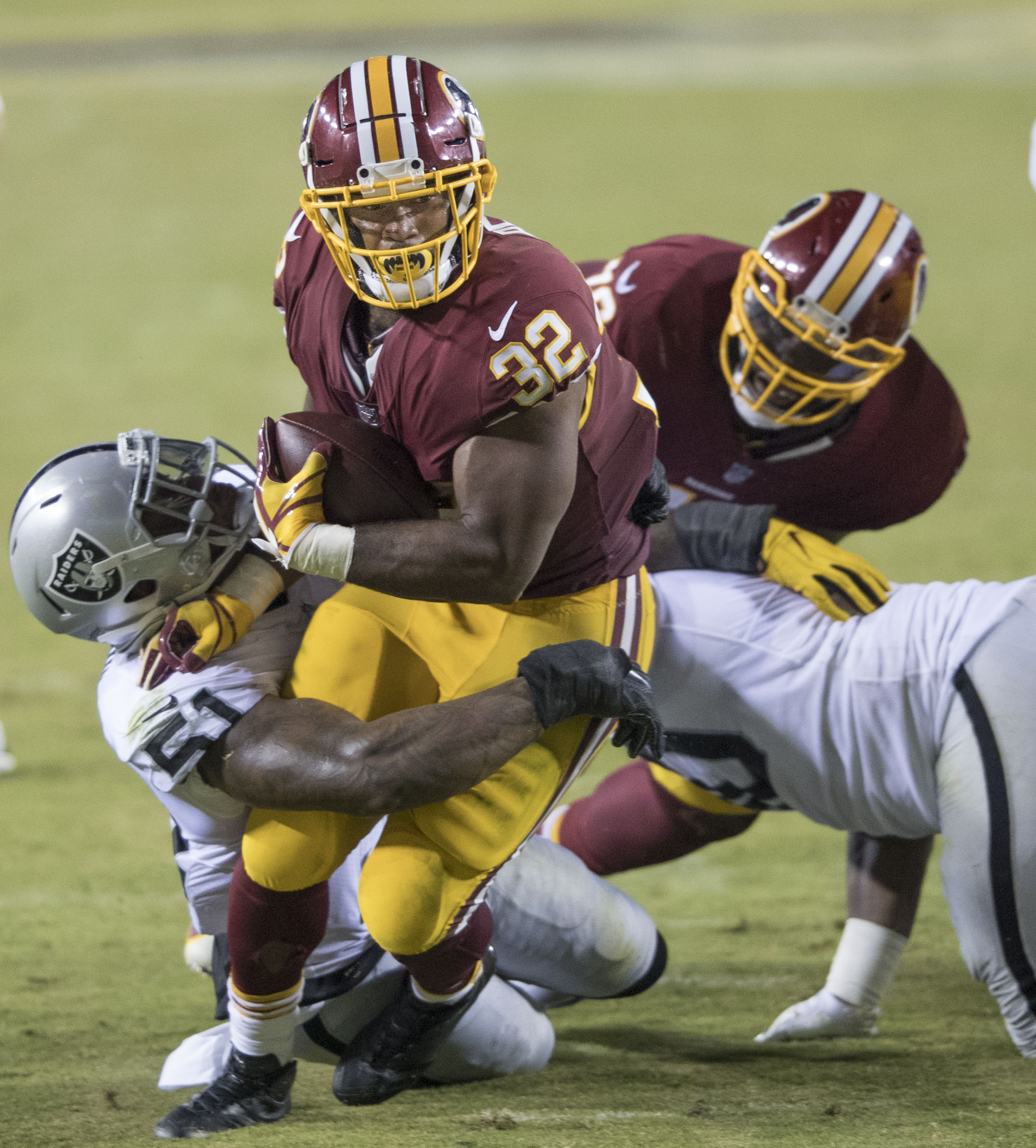 Raiders at Redskins 9/24/17